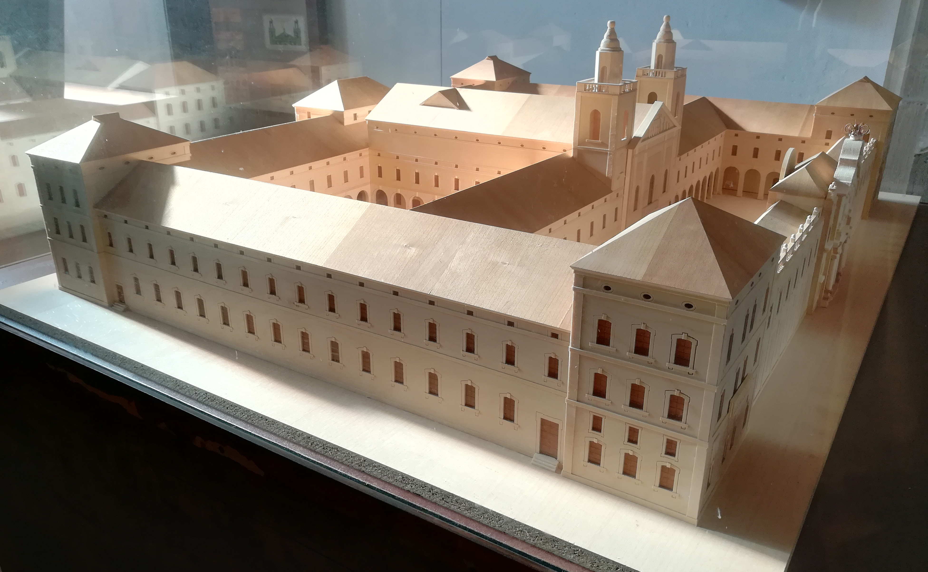 Edifici de la Universitat (Cervera)